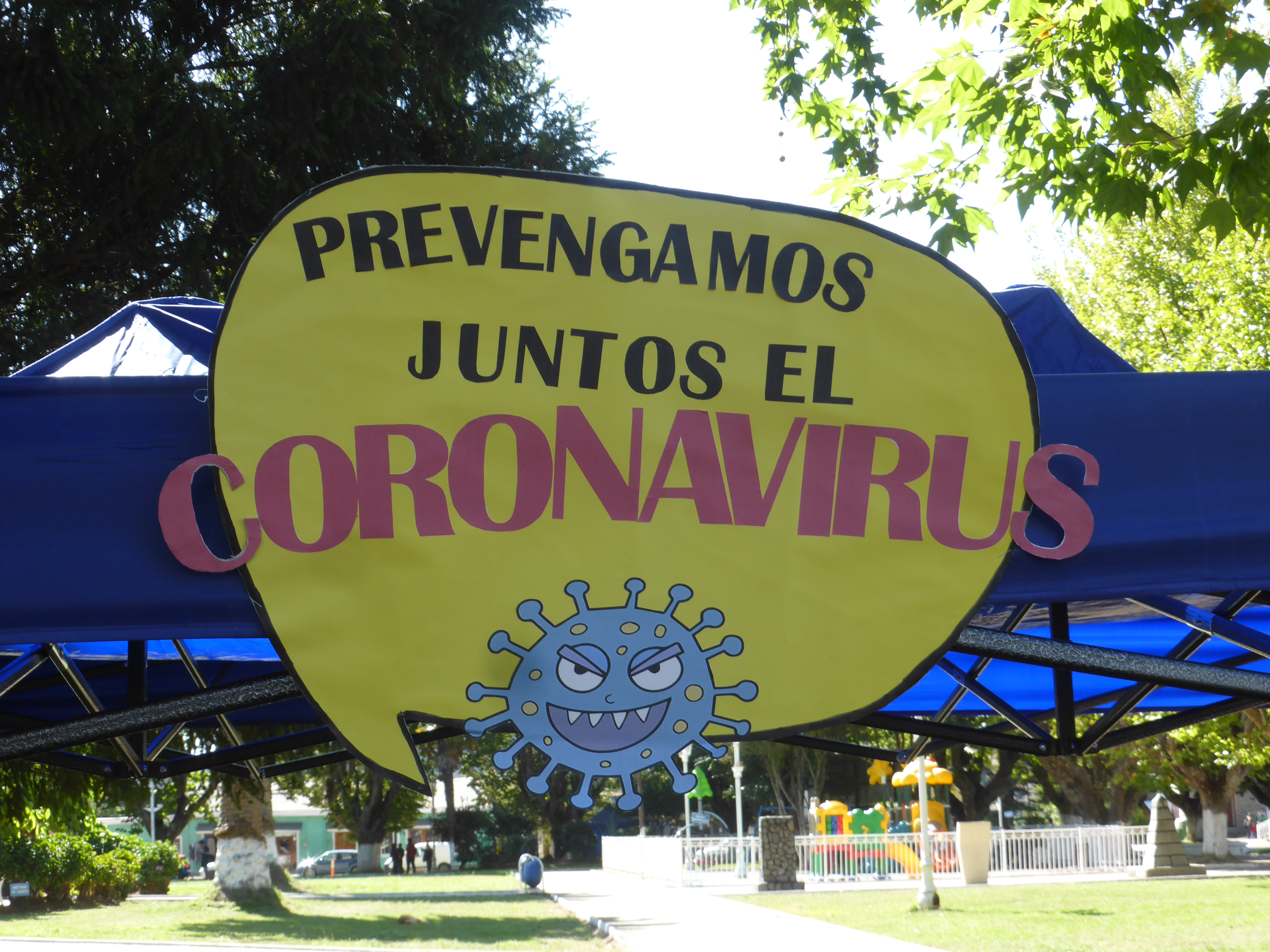 Prevención de la enfermedad por coronavirus de 2020 en Chile. En la Plaza de Armas de Carahue (Araucanía, Chile), el Departamento de Salud de la Municipalidad de Carahue reparte información sobre las medidas preventivas a tomar frente al coronavirus.